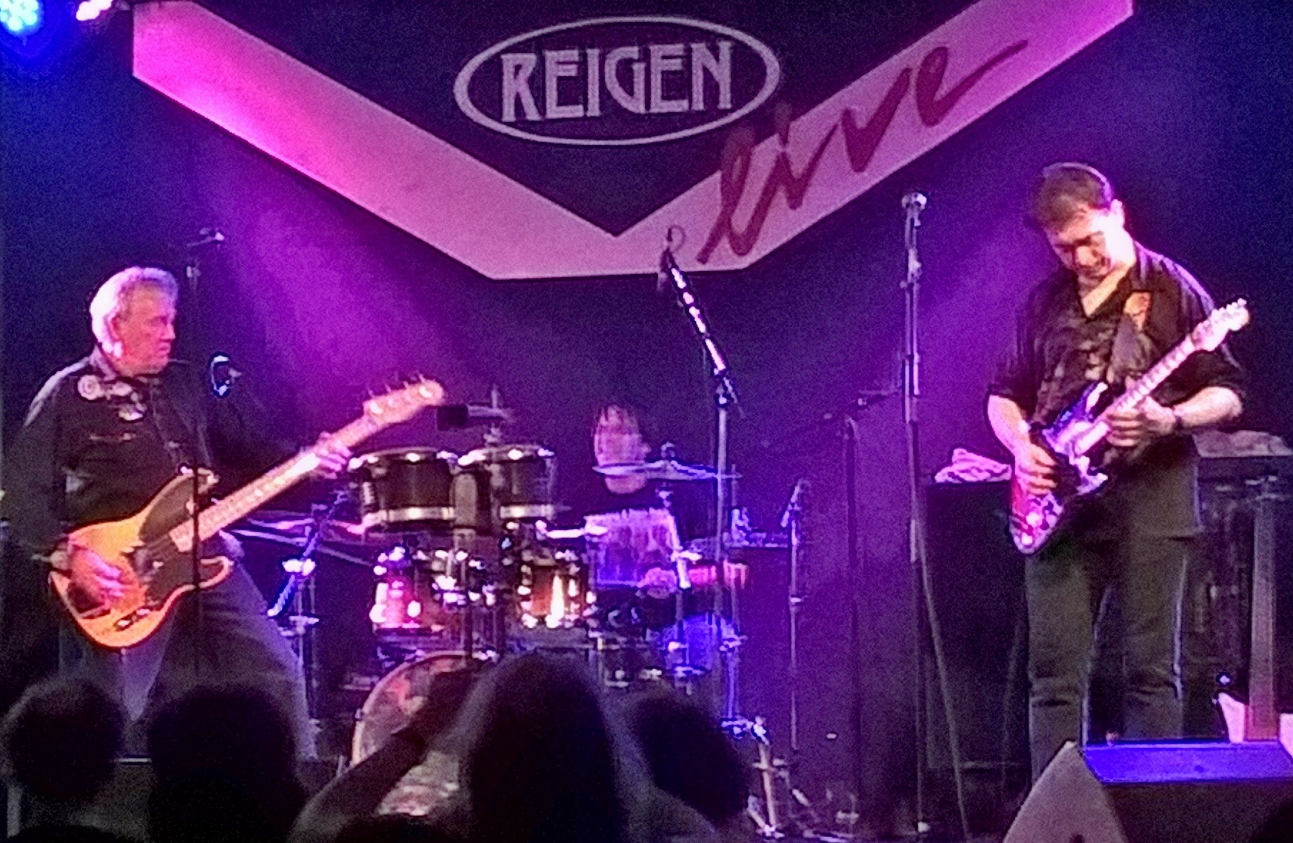 Konzertimpression (Auftritt von Nick Simper & Nasty Habits und Präsentation des Albums De La Frog Conspiracy)